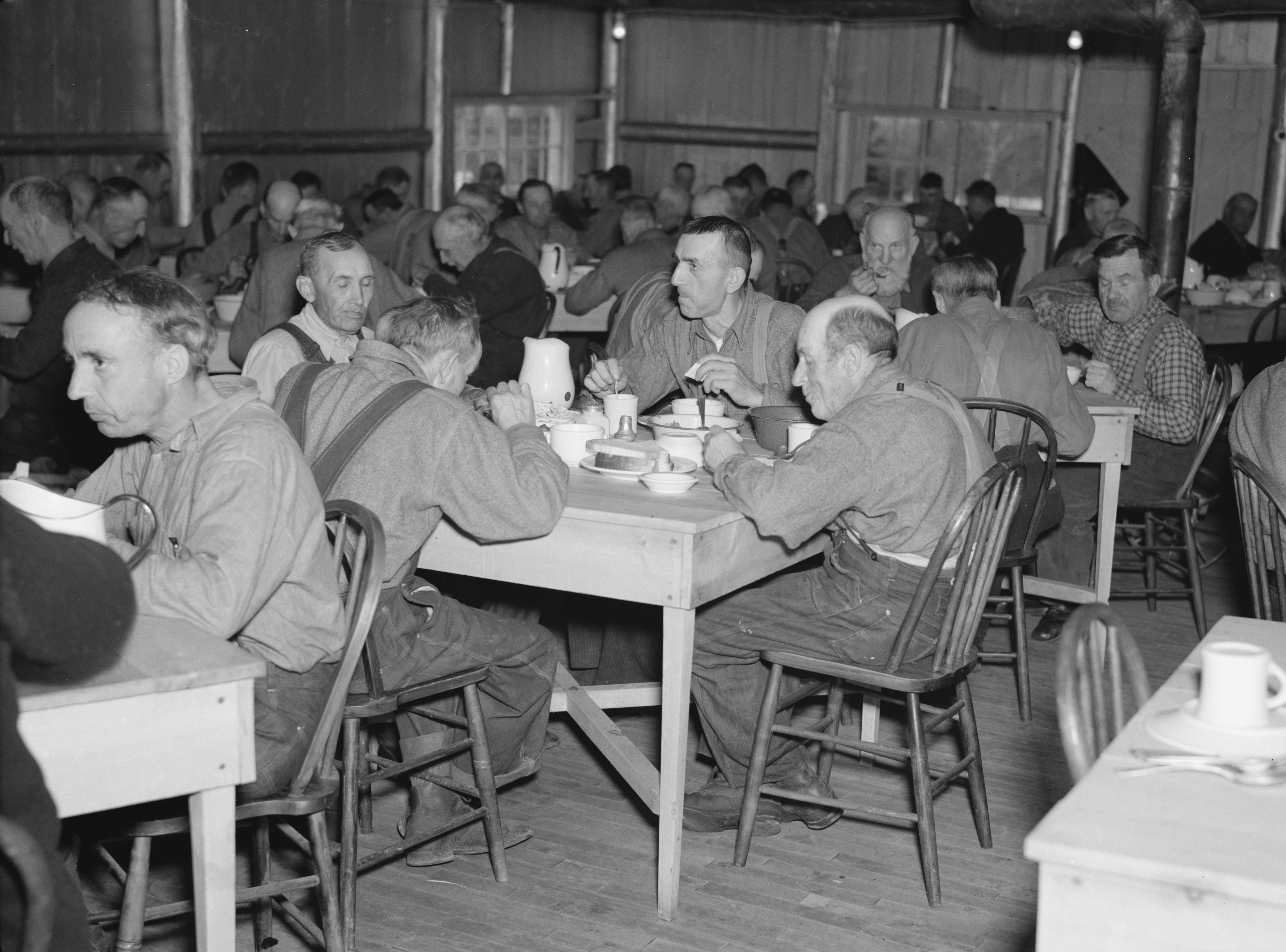 Russell Lee, Men in transient camp near Hagerman Lake, Michigan, avril 1937 Library of Congress, Prints & Photographs Division, FSA-OWI Collection, LC-USF34-010818-D DLC Domaine public, au moins aux États-Unis d'Amérique (